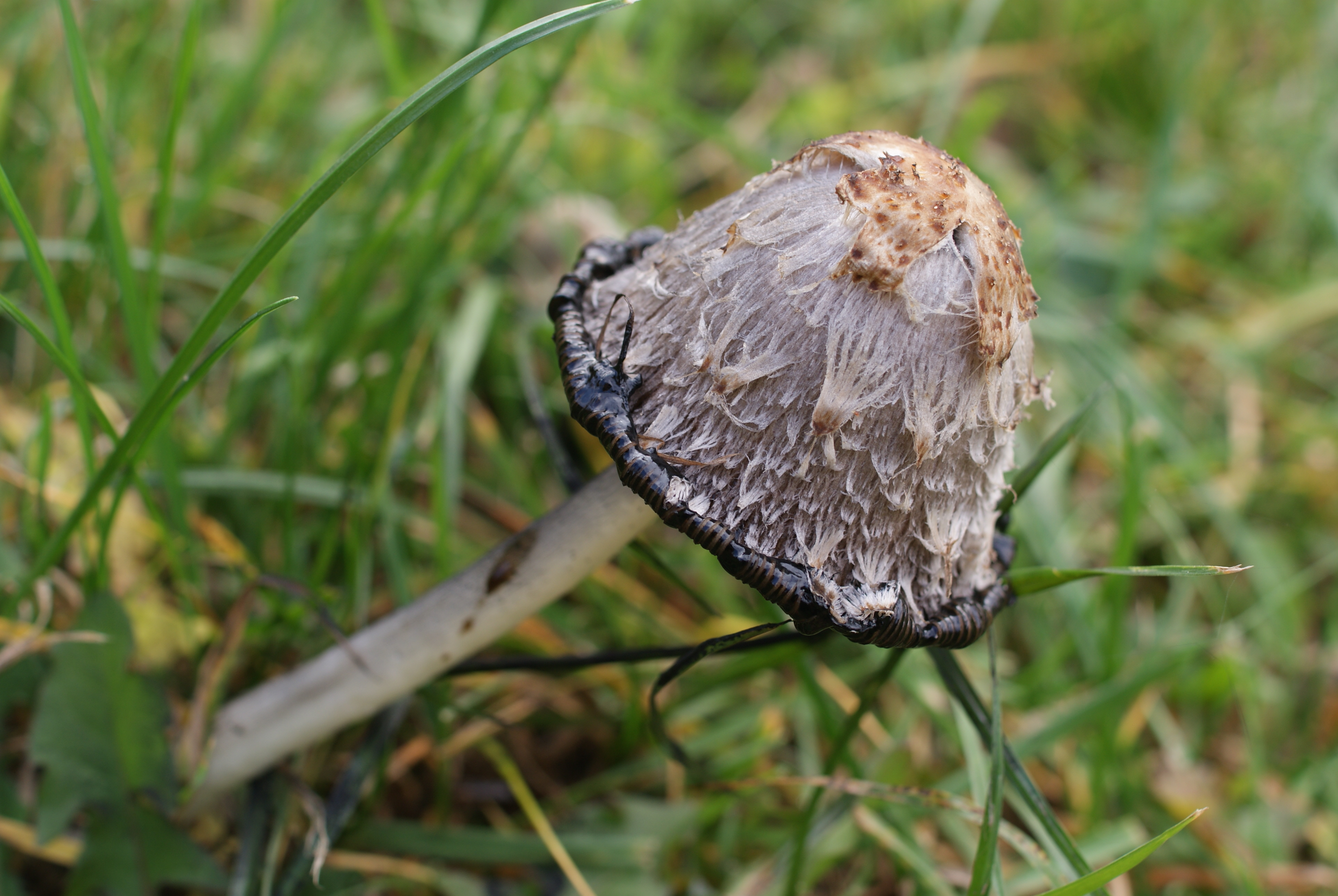 Невядомы грыб у Севастопальскім парку